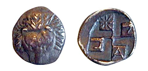 Монета из музейной коллекции. Пантикапей. Диобол. V в. до н.э.